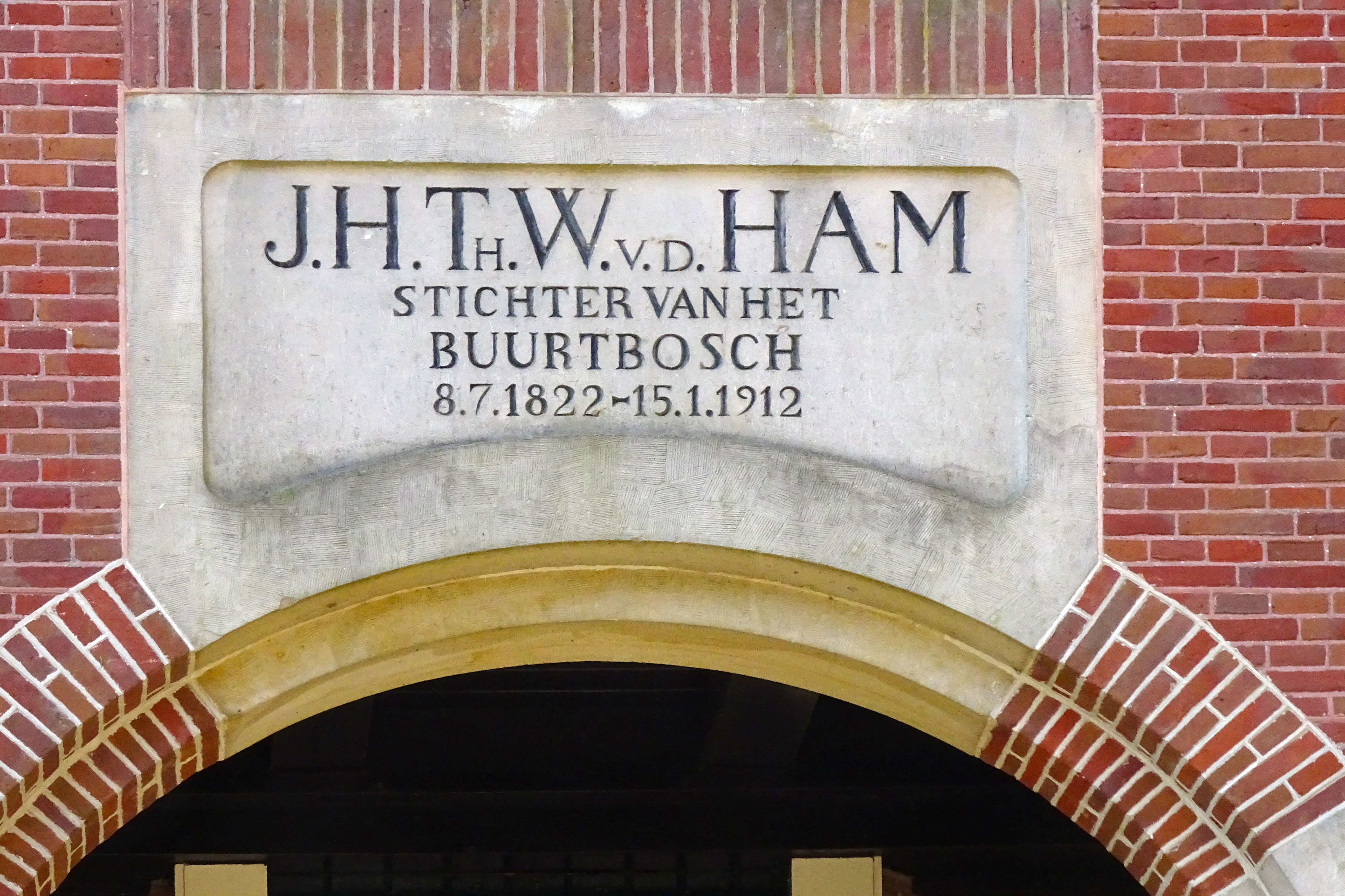 Gedenksteen in de koepel ter herinnering aan de stichter van het Luntersche Buurtbosch, notaris Johannes Hermannus Theodorus Wilhelmus van den Ham